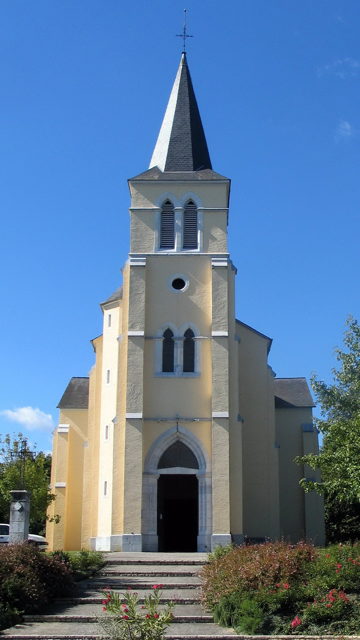 Eglise Serres Morlaas 2007